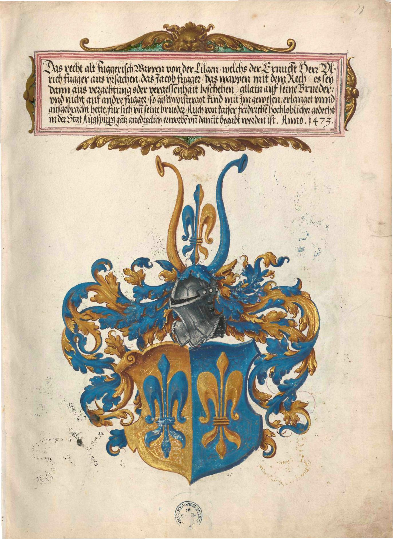 Geheimes Ehrenbuch der Fugger, hergestellt in der Werkstatt Jörg Breu d. J., 1545–1549 Wappendarstellung Fugger zur Lilie